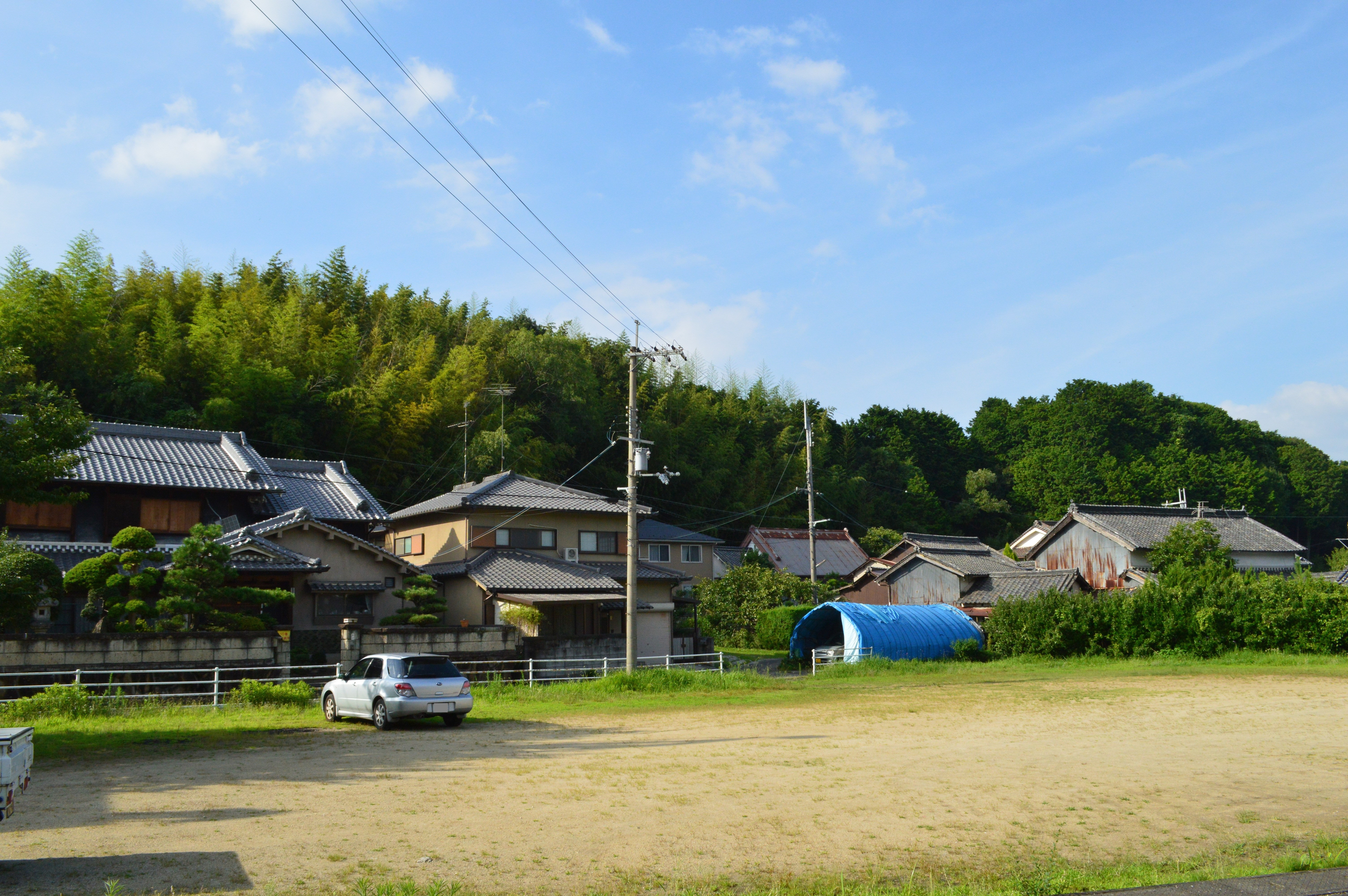 室宮山古墳 全景 (南方より)